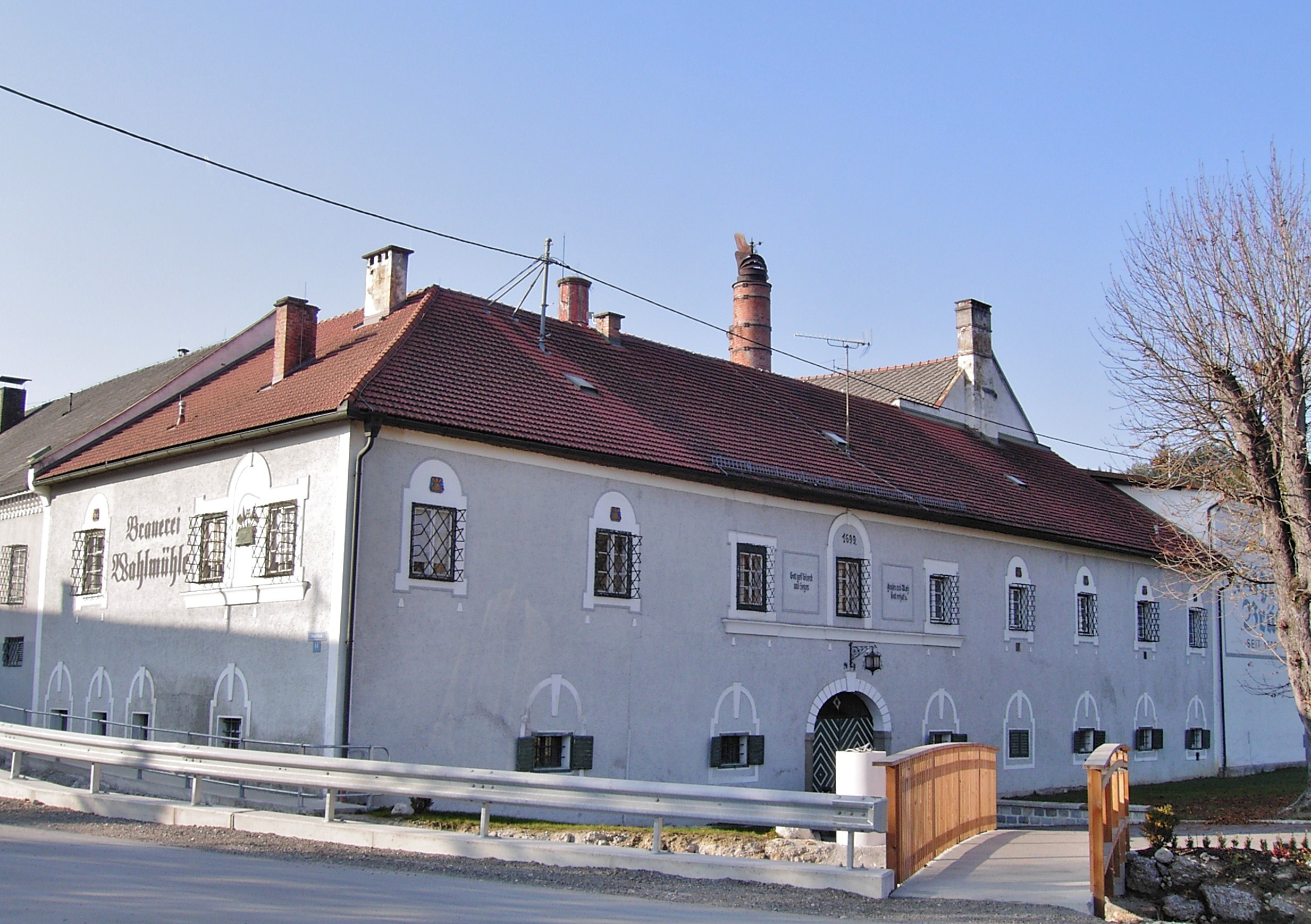 Sierning, ehemalige Brauerei und Wohnhaus Wahlmühle, Steyrer Straße 41